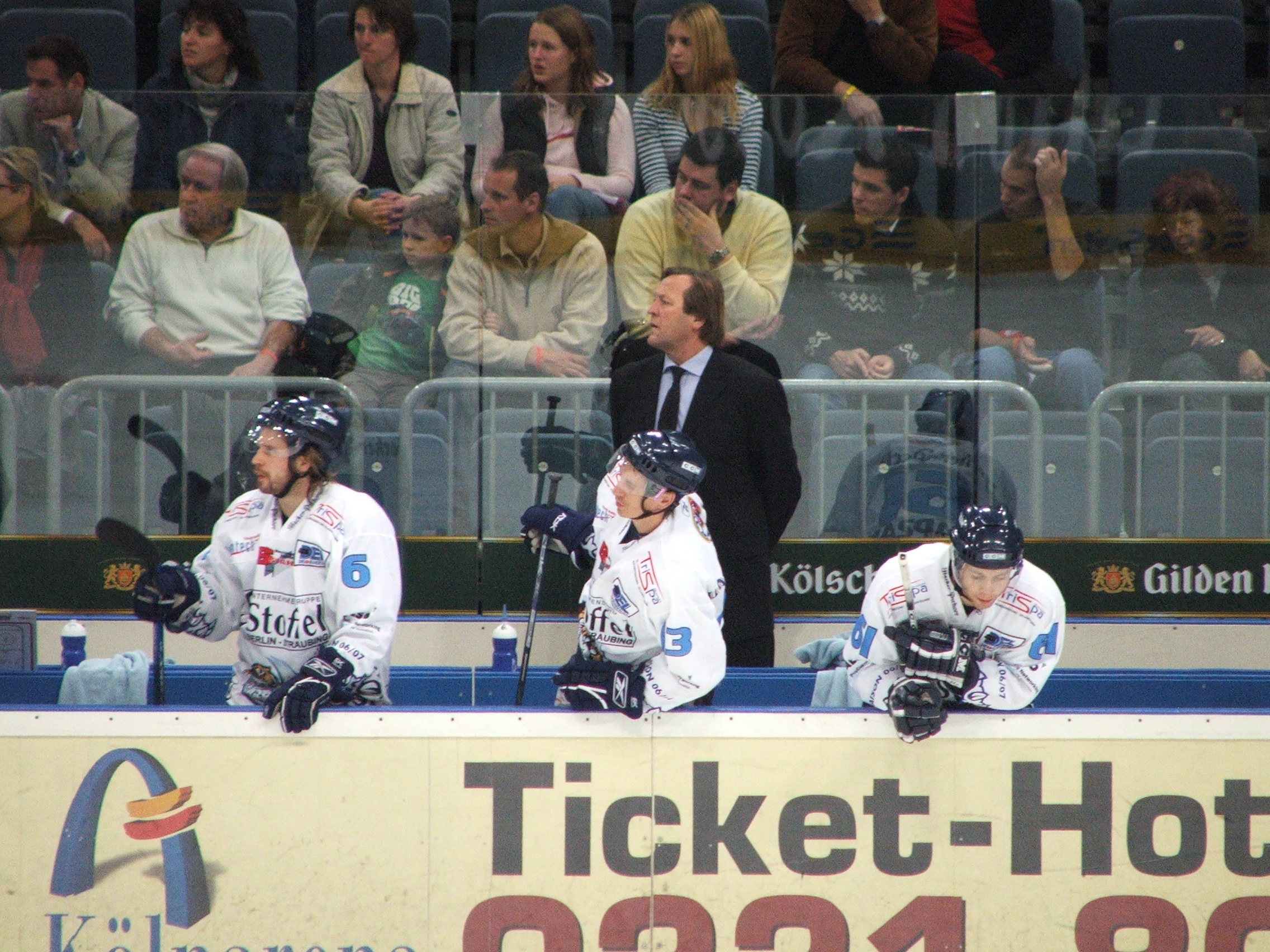 Erich Kühnhackl auf der Bank der Straubing Tigers